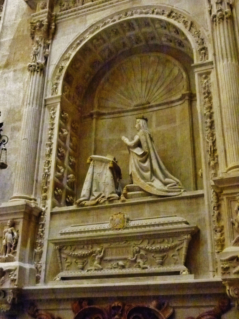 Sepulcro de la reina Beatriz de Suabia (1205-1235), que fue esposa de Fernando III el Santo y madre de Alfonso X el Sabio, en la Capilla Real de la catedral de Sevilla, (España).